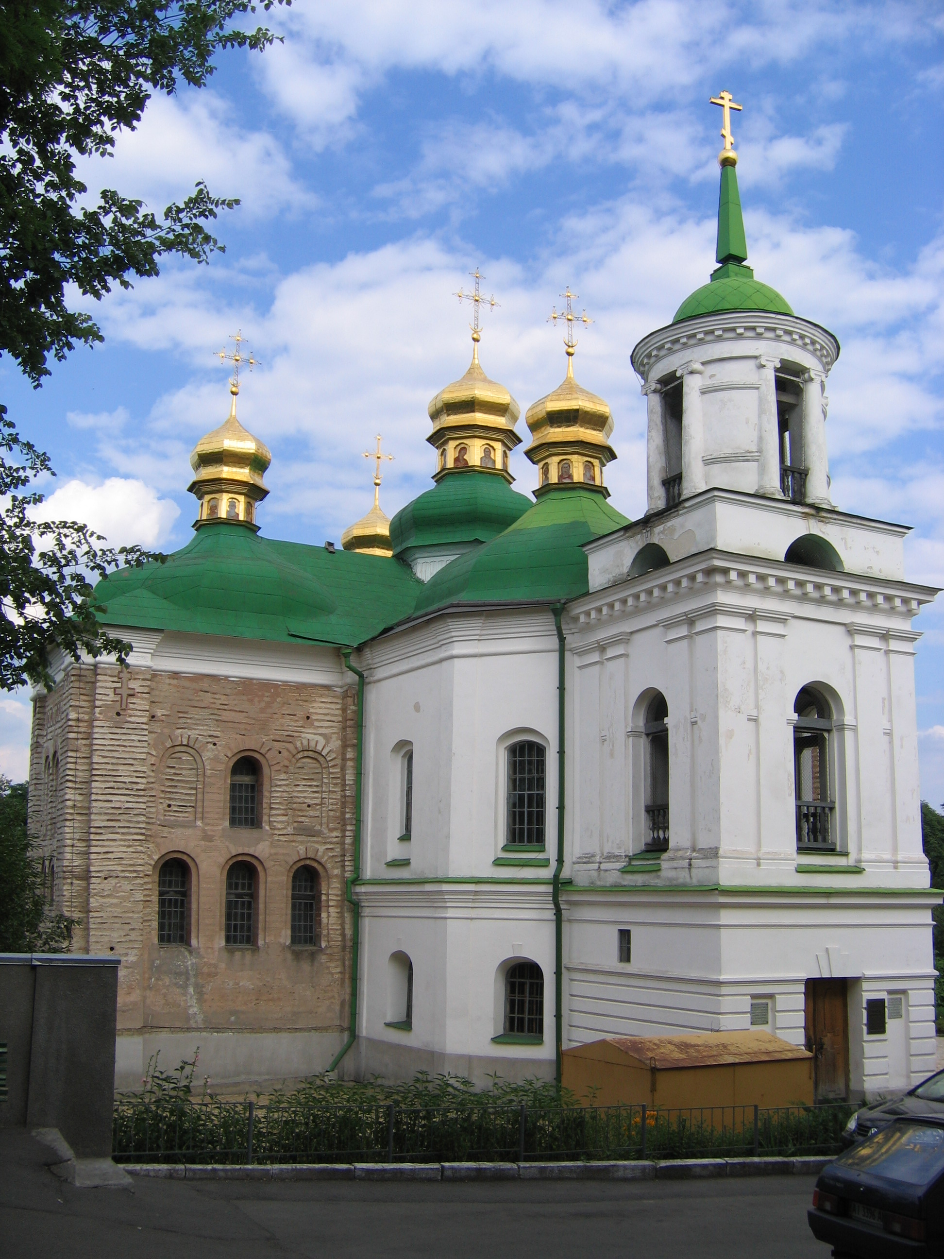 Церковь Спаса на Берестове